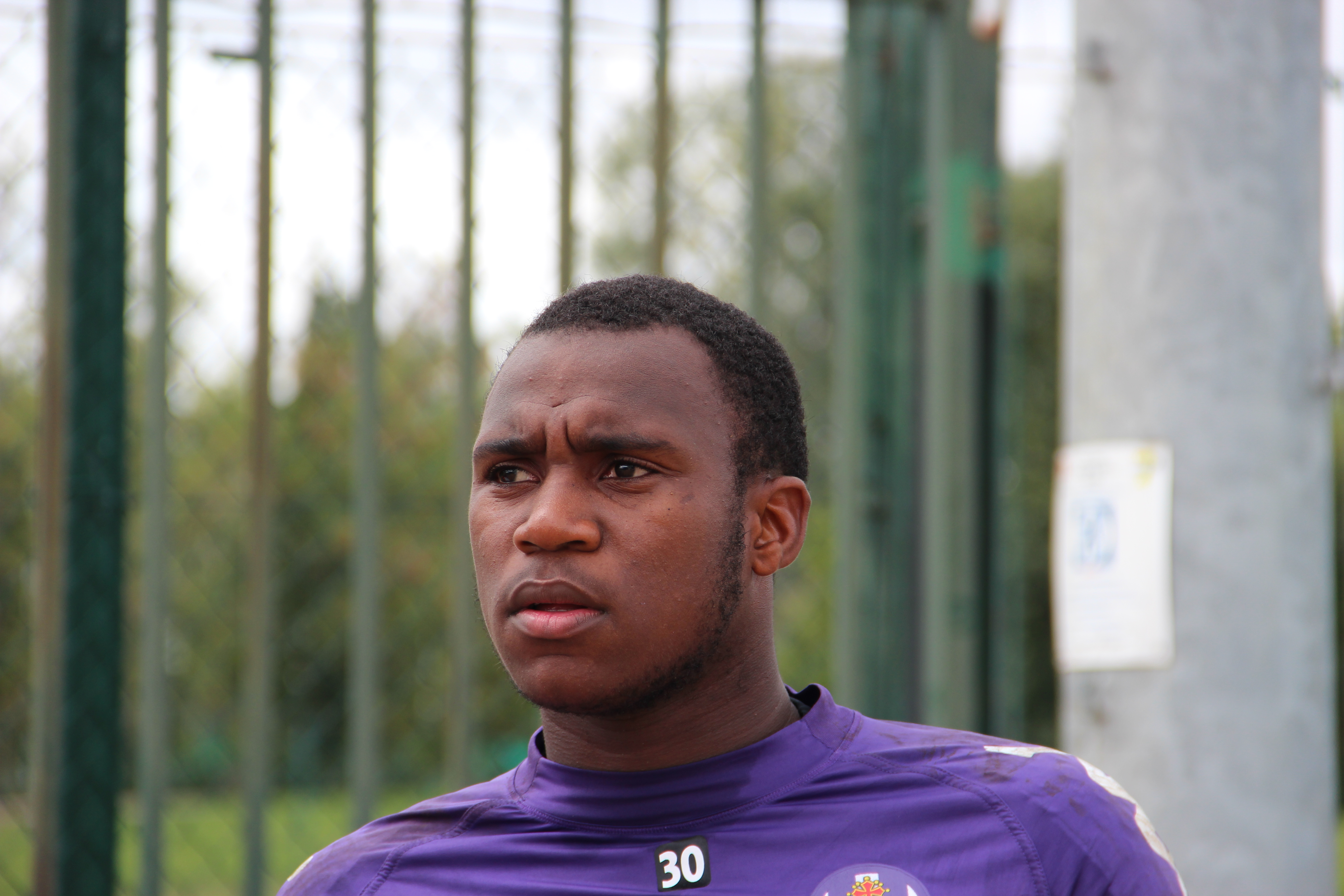 Entraînement du Toulouse Football Club, le 12 septembre 2012. Ali Ahamada